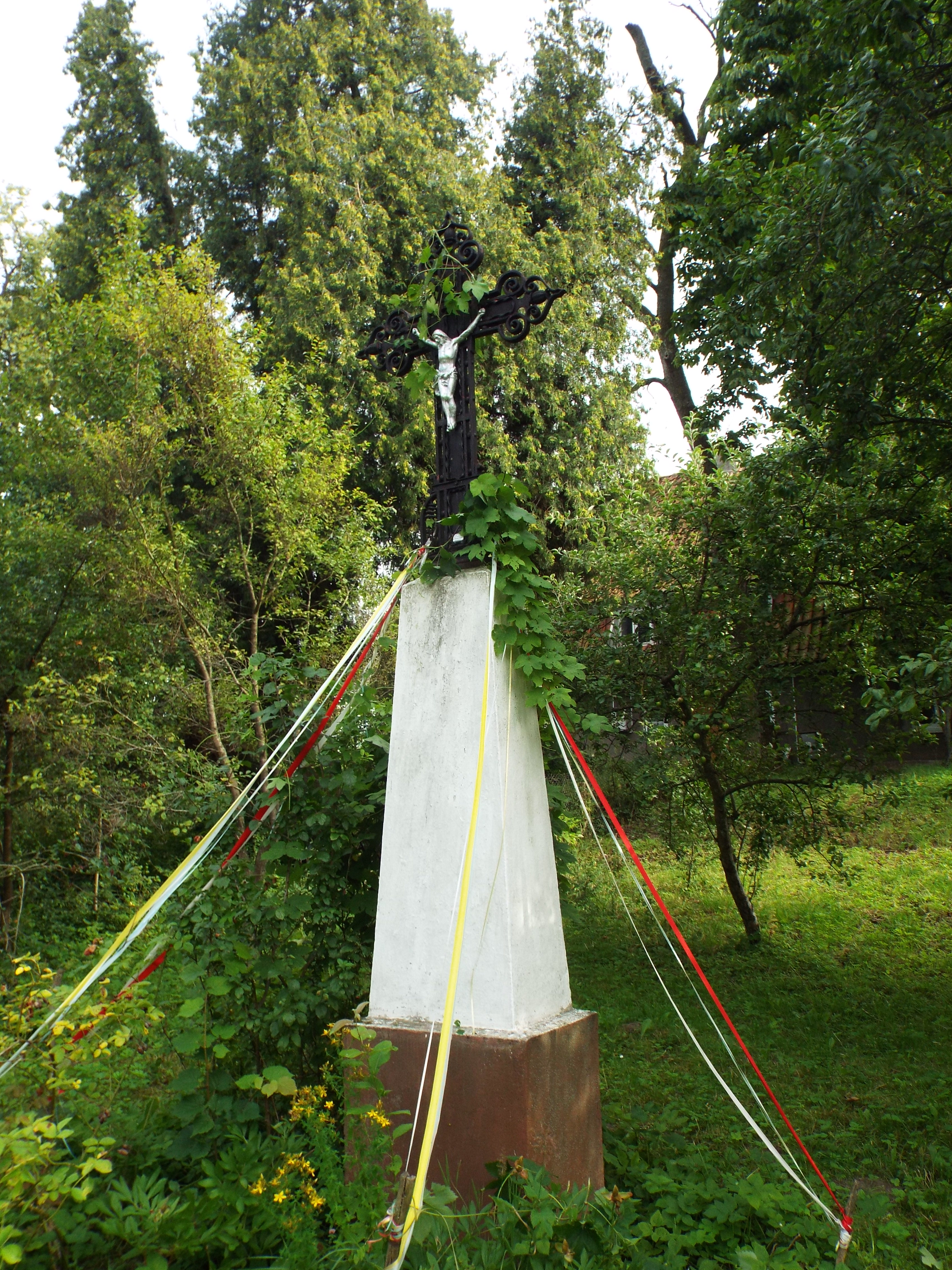 Brzezina - krzyż